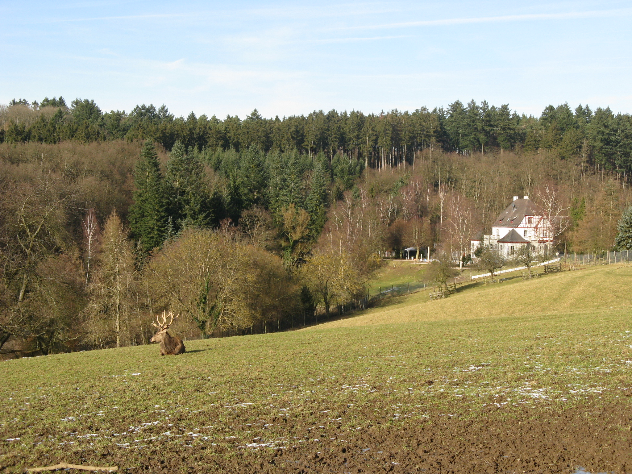 Remstecken, deer park near Koblenz, Germany